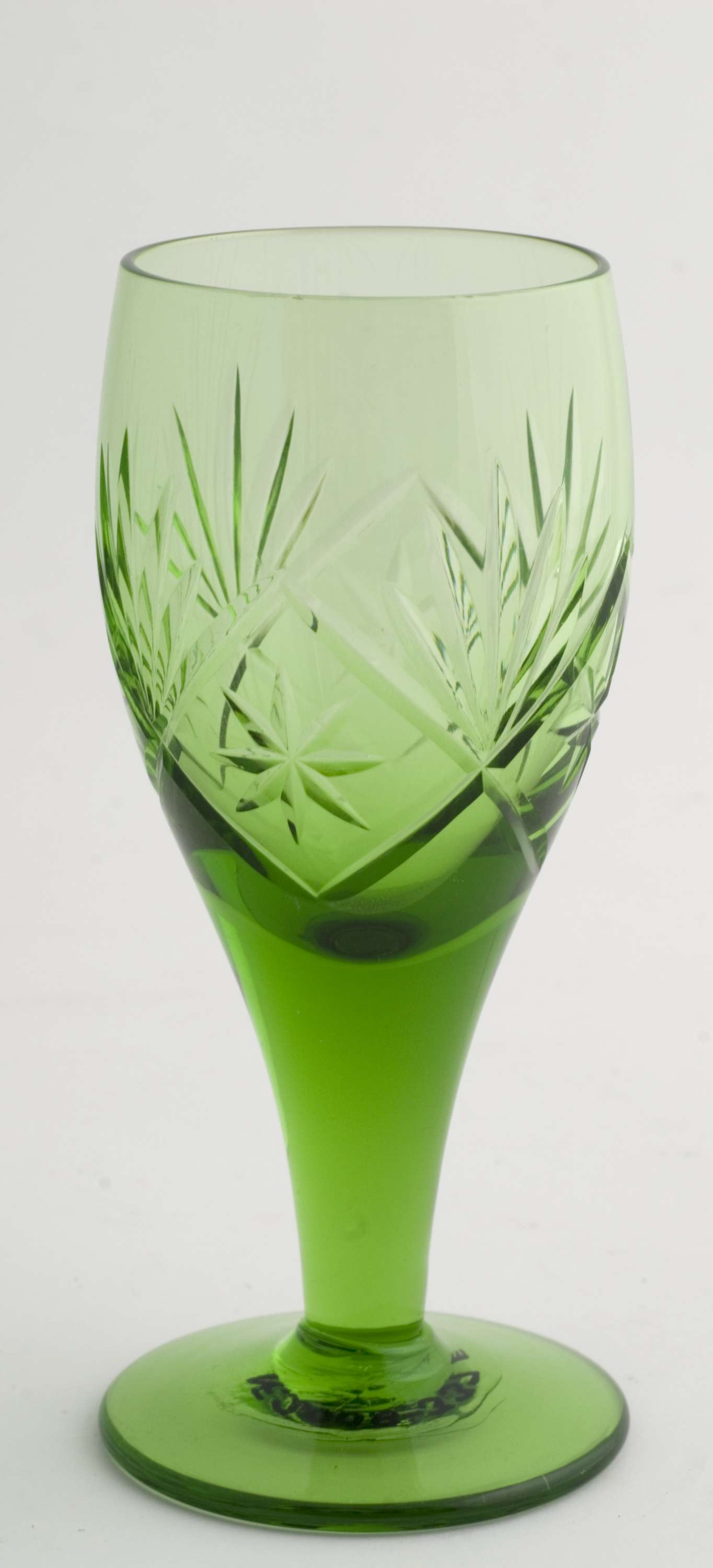 Hvitvinsglass i serien "Finn" produsert på Hadeland Glassverk. Norsk Folkemuseum NF. 2008-0337AF